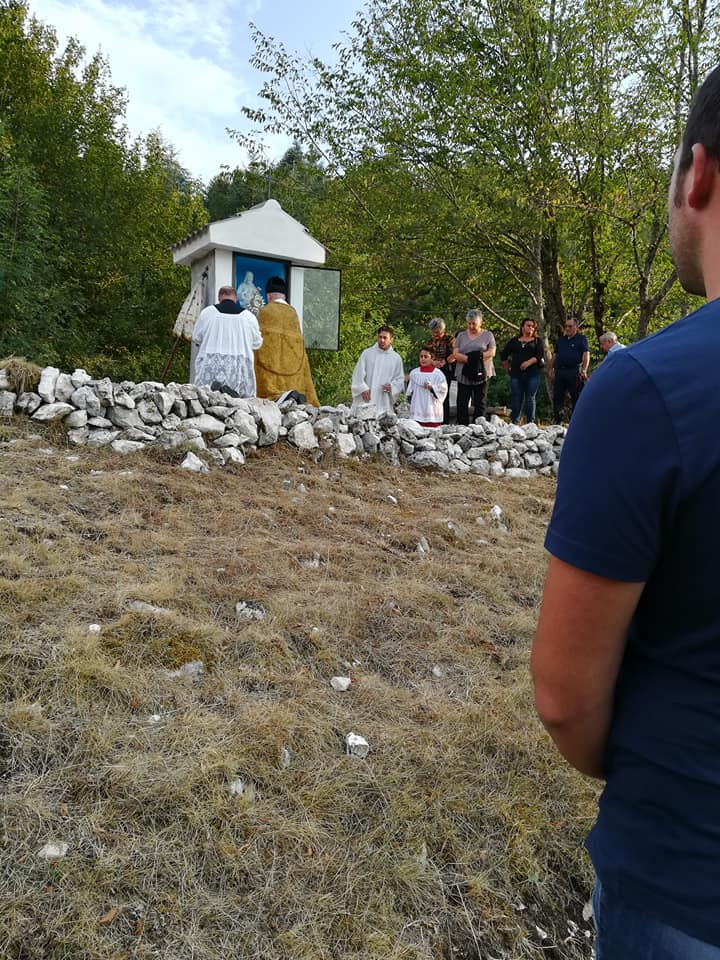 Adorazione Eucaristica presso la cappellina del Sacro Cuore, sul sentiero delle XII Stelle